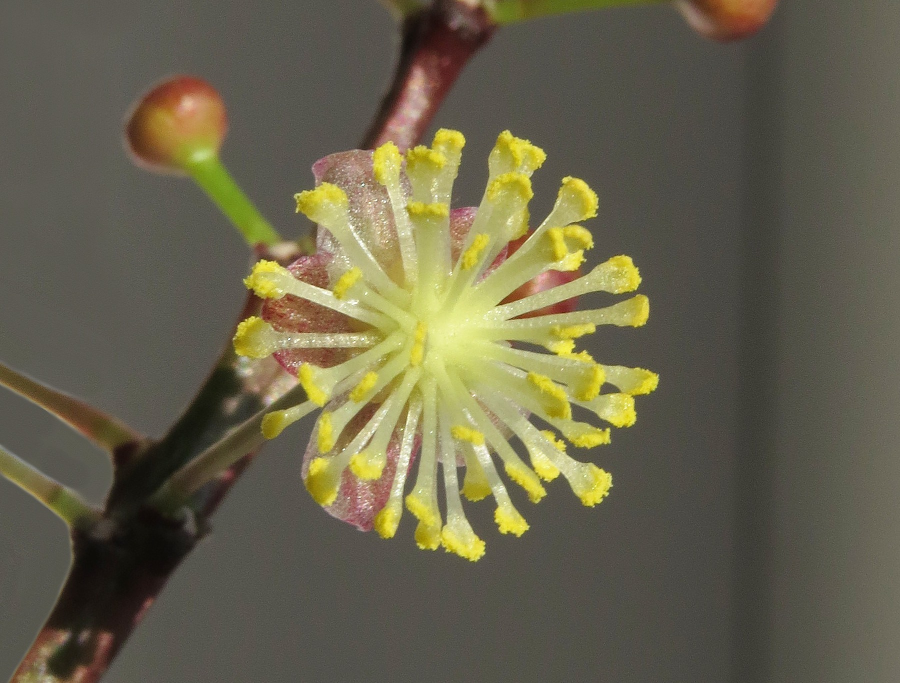 Flor masculina de Codiaeum variegatum (Euphorbiaceae).